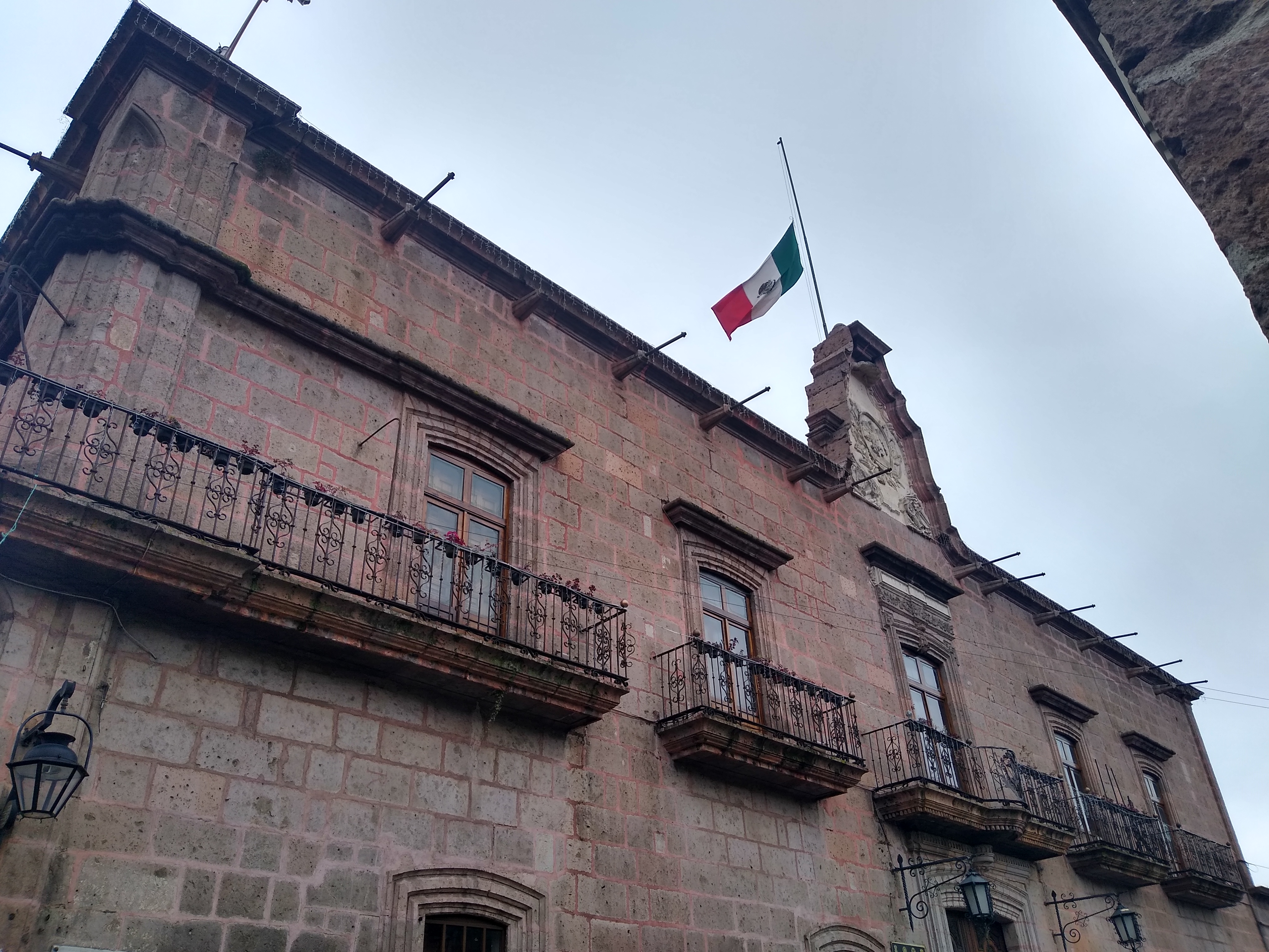 Palacio municipal de Morelia 01